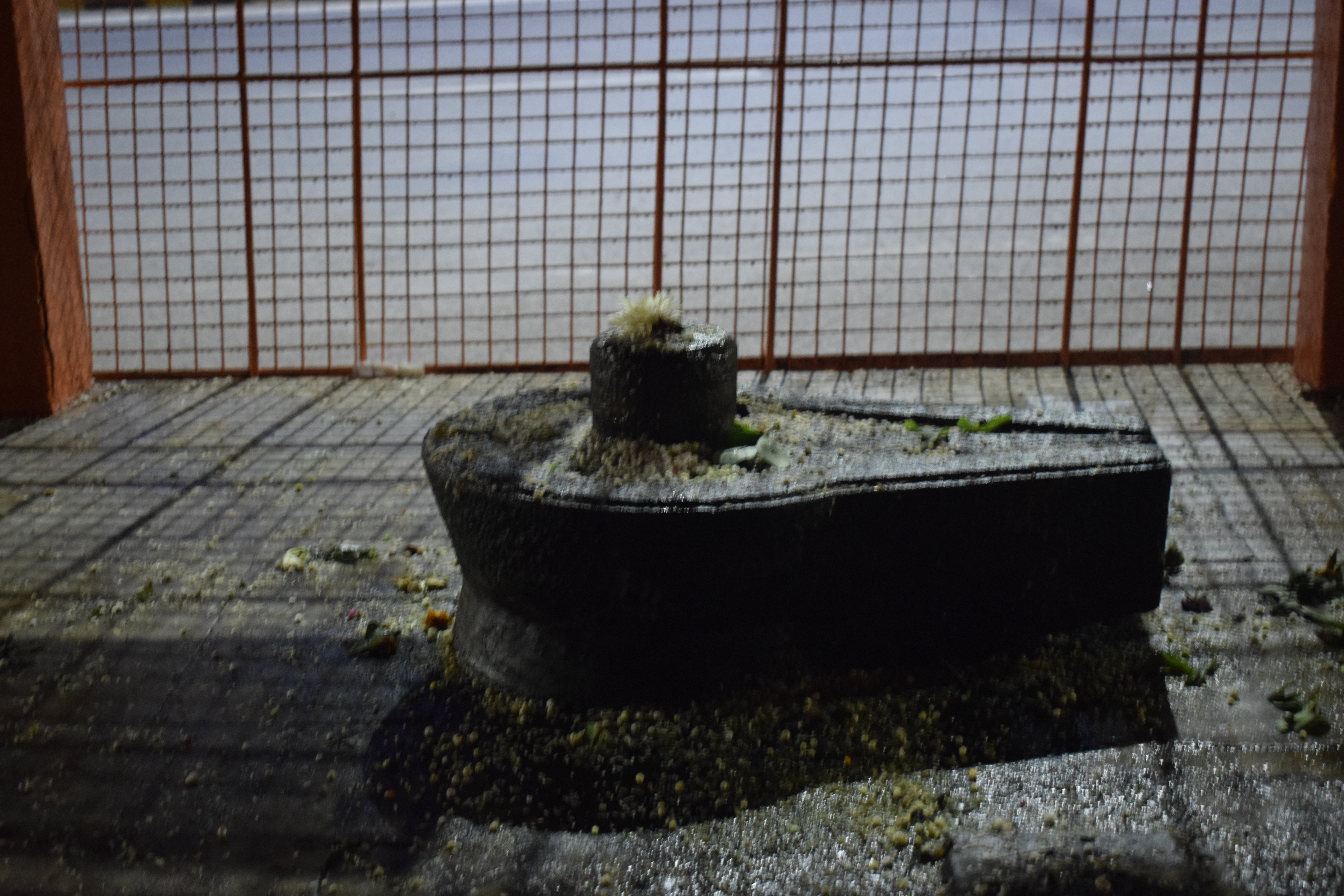 श्री कोपेश्वर लिंग